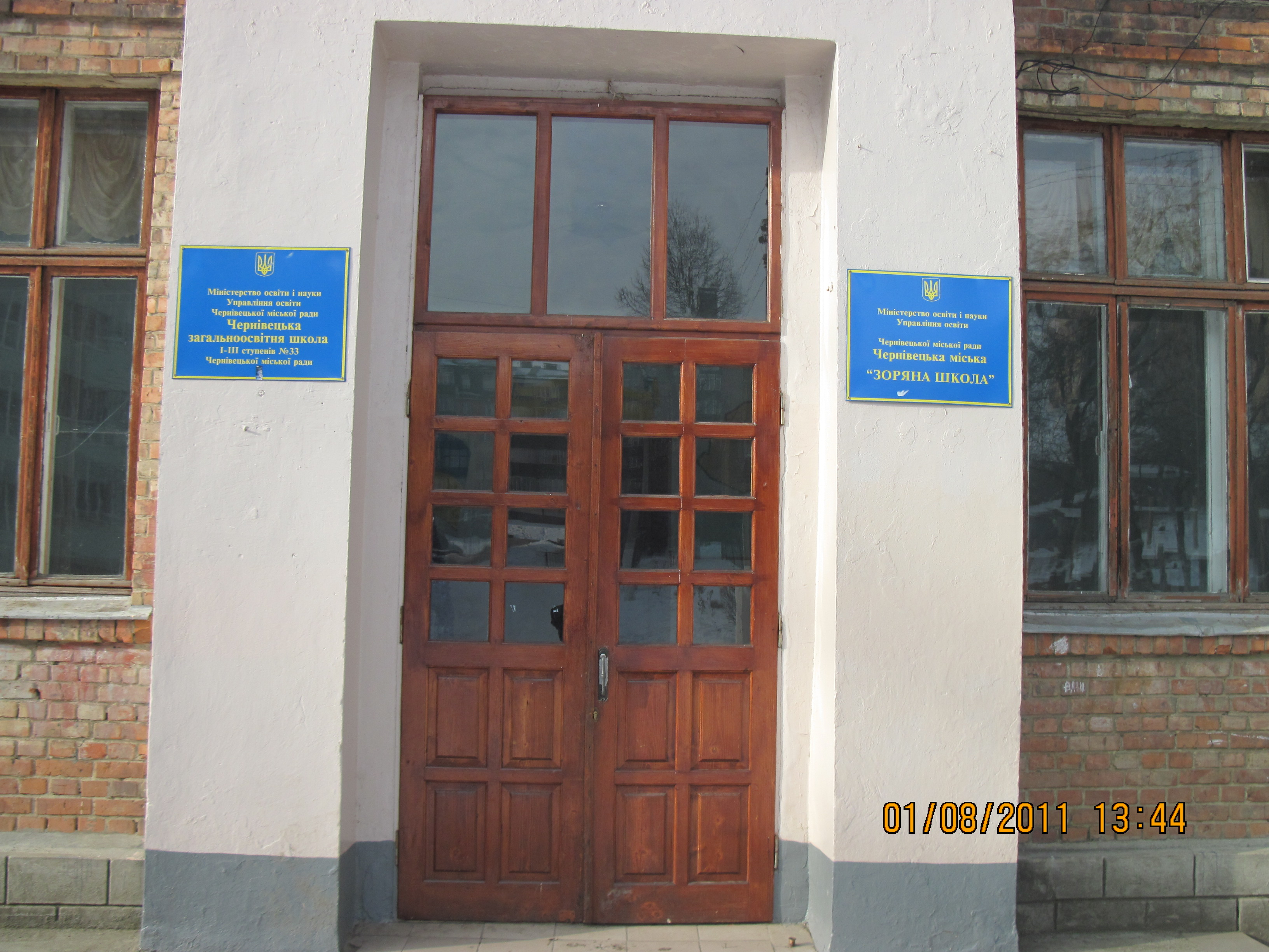 Середня школа №33, вул. Червоноармійська 152-а, місто Чернівці. Парадний вхід.